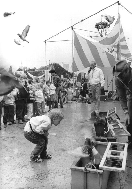 Berlin, Gartenfest des VKSK ADN-ZB Uhlemann 21.6.1987 Berlin: Jubiläum. In der Pankower Nordend-Arena und acht umliegenden Sparten gestalteten die Mitglieder des Verbandes der Kleingärtner, Siedler und Kleintierzüchter (VKSK) - wie auch in anderen traditionsreichen Anlagen der Hauptstadt - große Gartenfeste. Ein Taubenauflaß von 50.000 Sporttauben aus Thüringer Bezirken war einer der Anziehungspunkte der vielgestaltigen Programme. (Siehe auch Fotos /6 und 8 N).